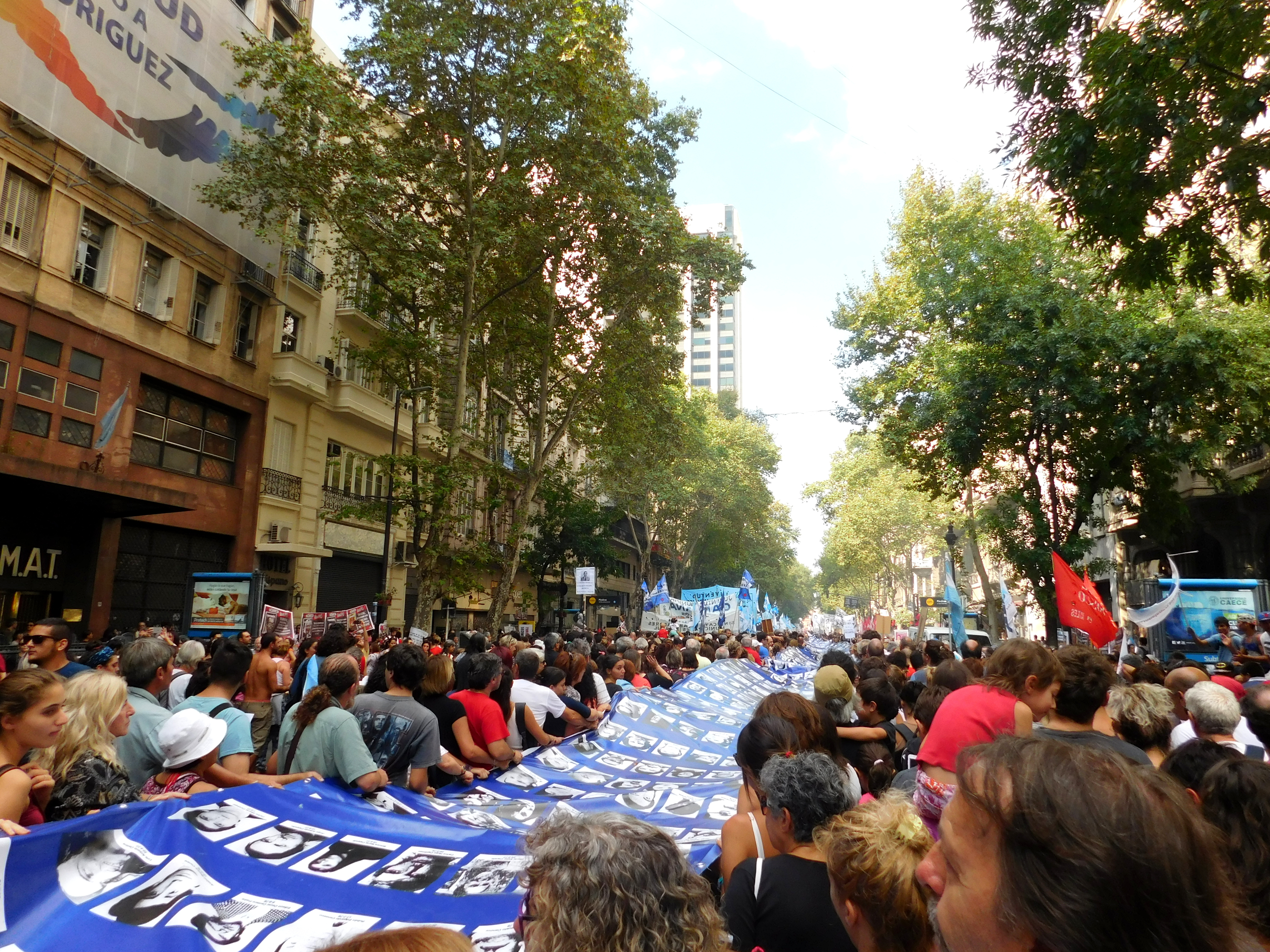 Día de la Memoria 2016.